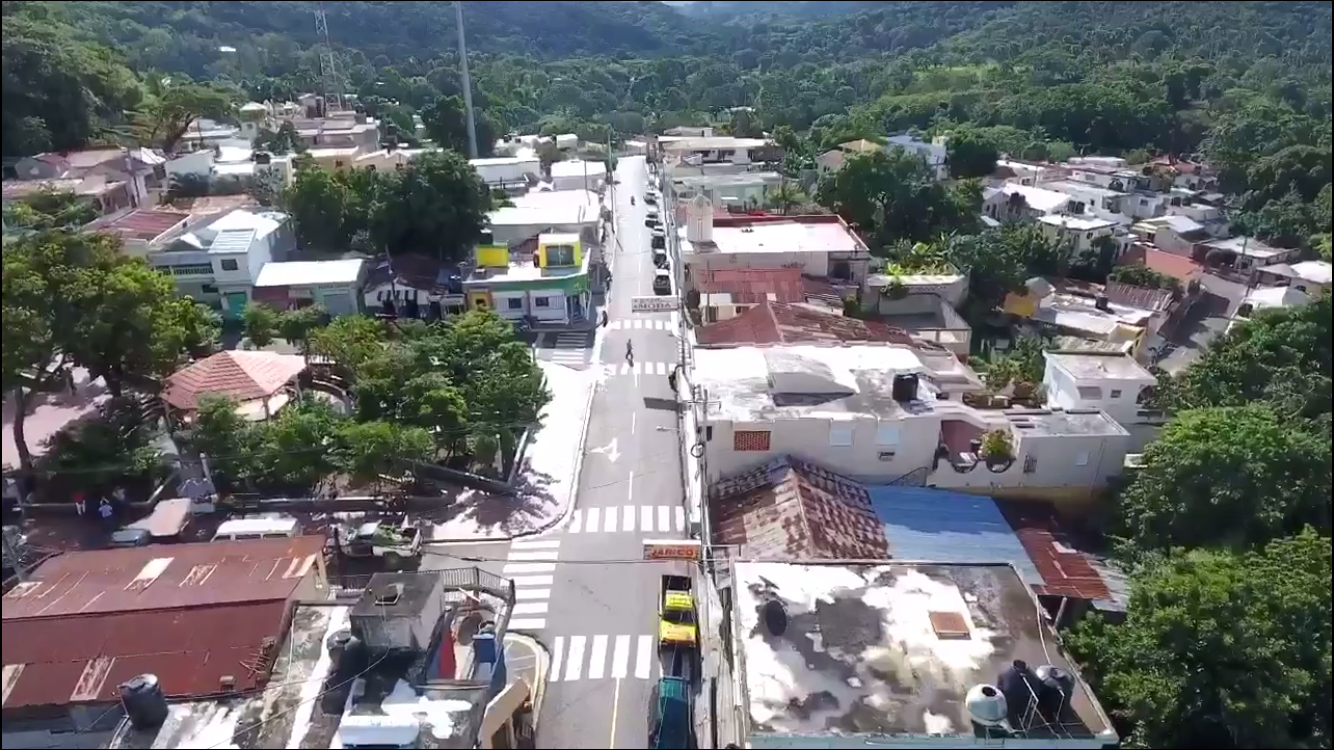 Vista De la Calle Federico Pichardo en el casco urbano de Jánico